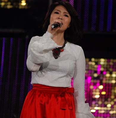 曹雅雯出席三立電視綜藝節目《超級夜總會》錄影。